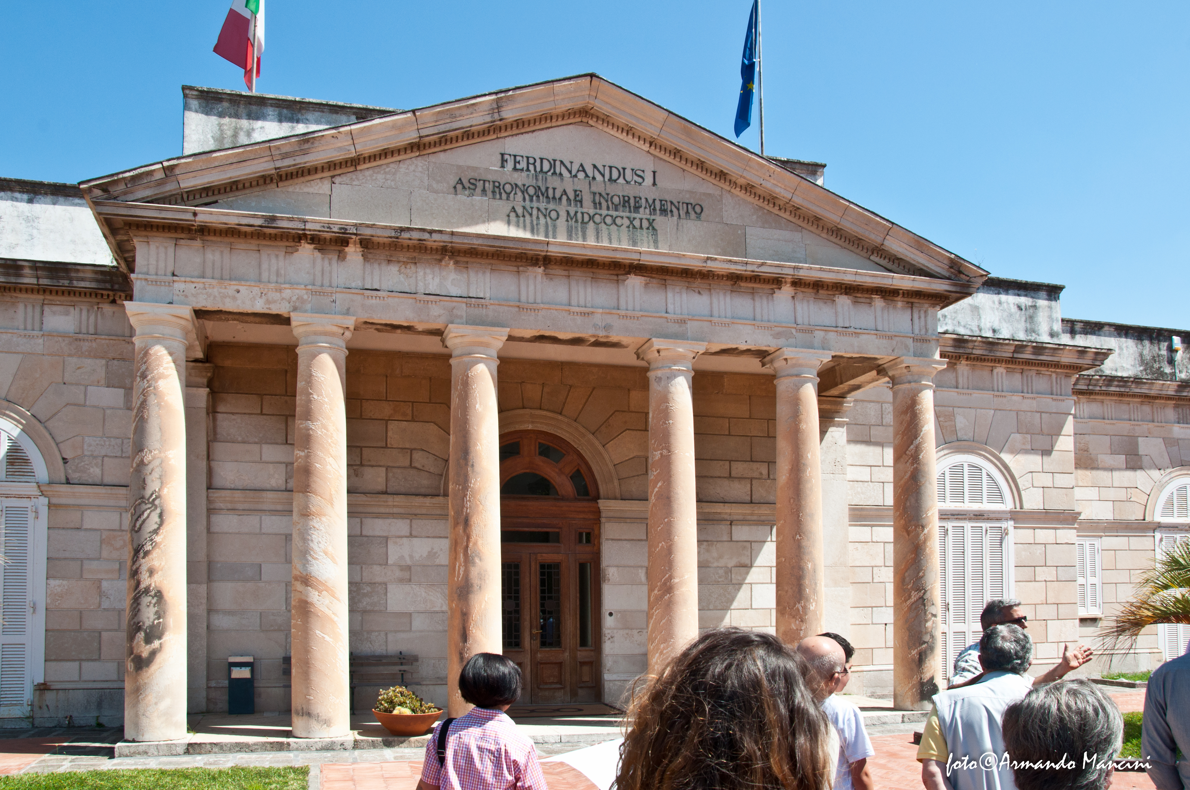 Osservatorio Astronomico di Campodimonte (Napoli) La facciata dell'con il colonnato borbonico.